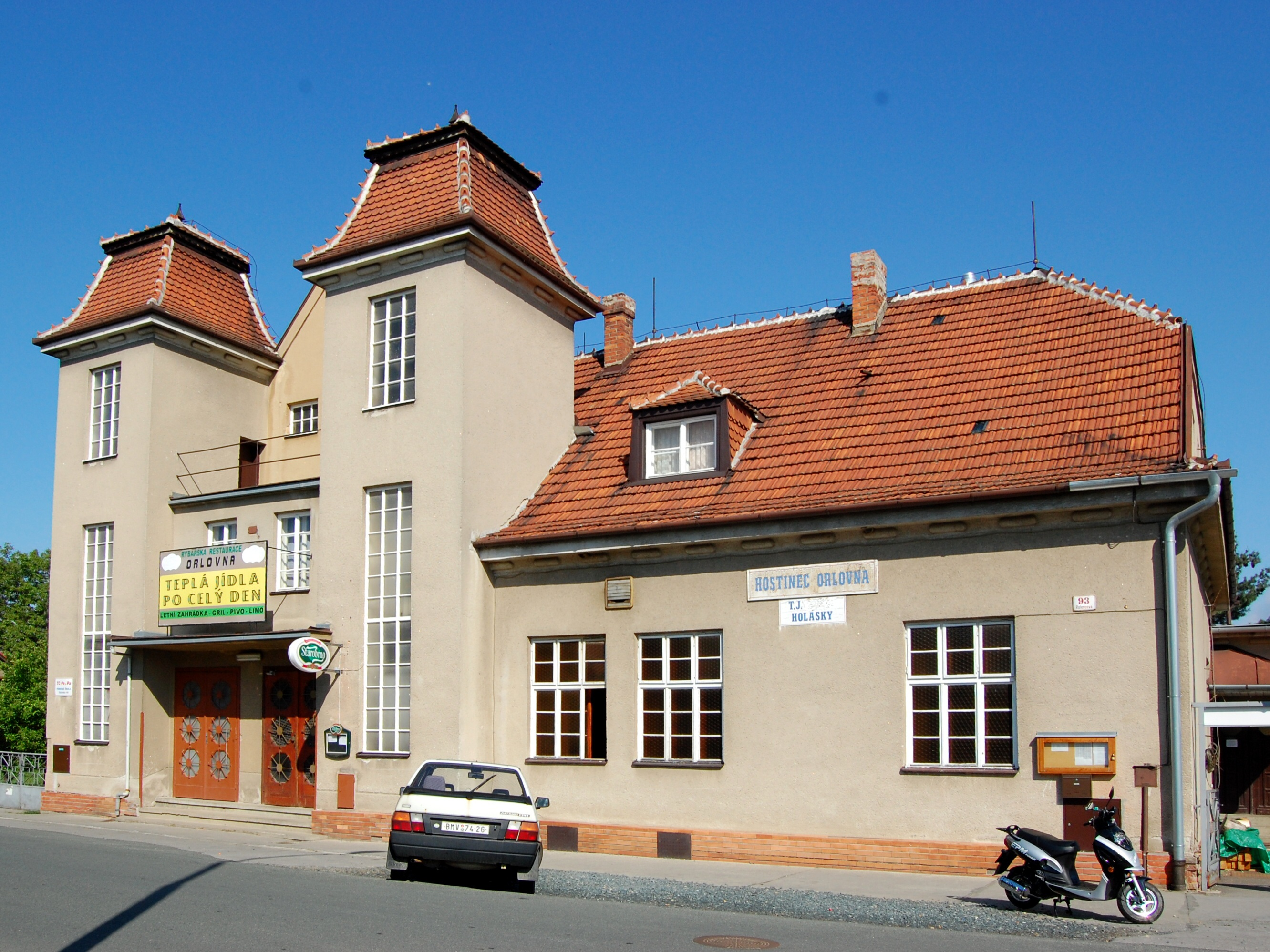 Orlovna, Brno-Tuřany, Rolencova 690/93